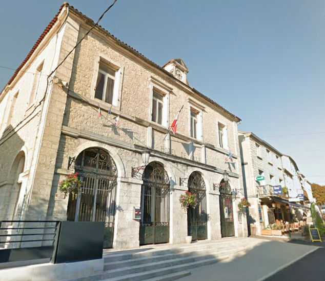 Mairie de Lalbenque